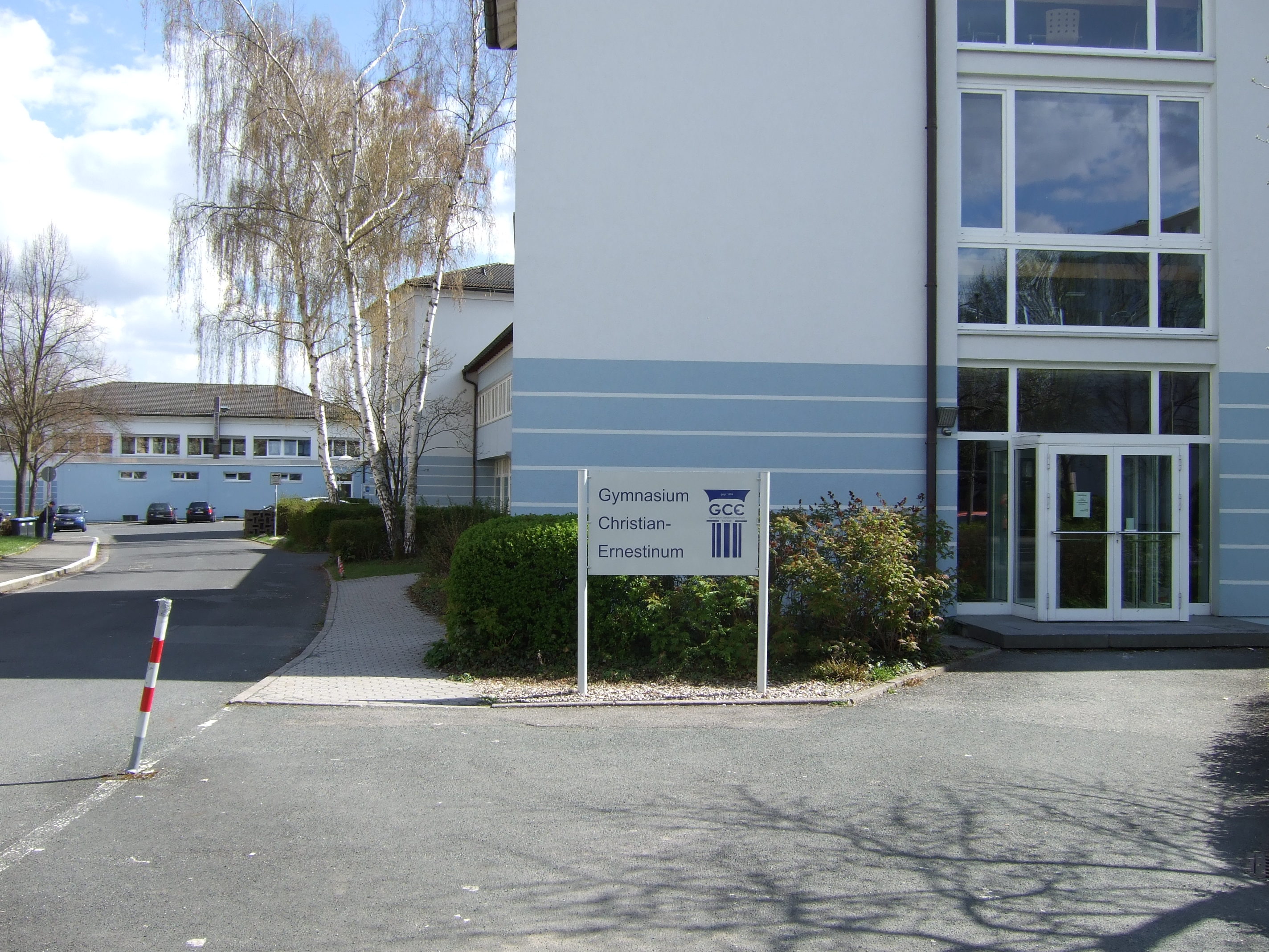 Gymnasium Christian-Ernestinum (GCE) Bayreuth, Albrechtt-Dürer-Str. 2